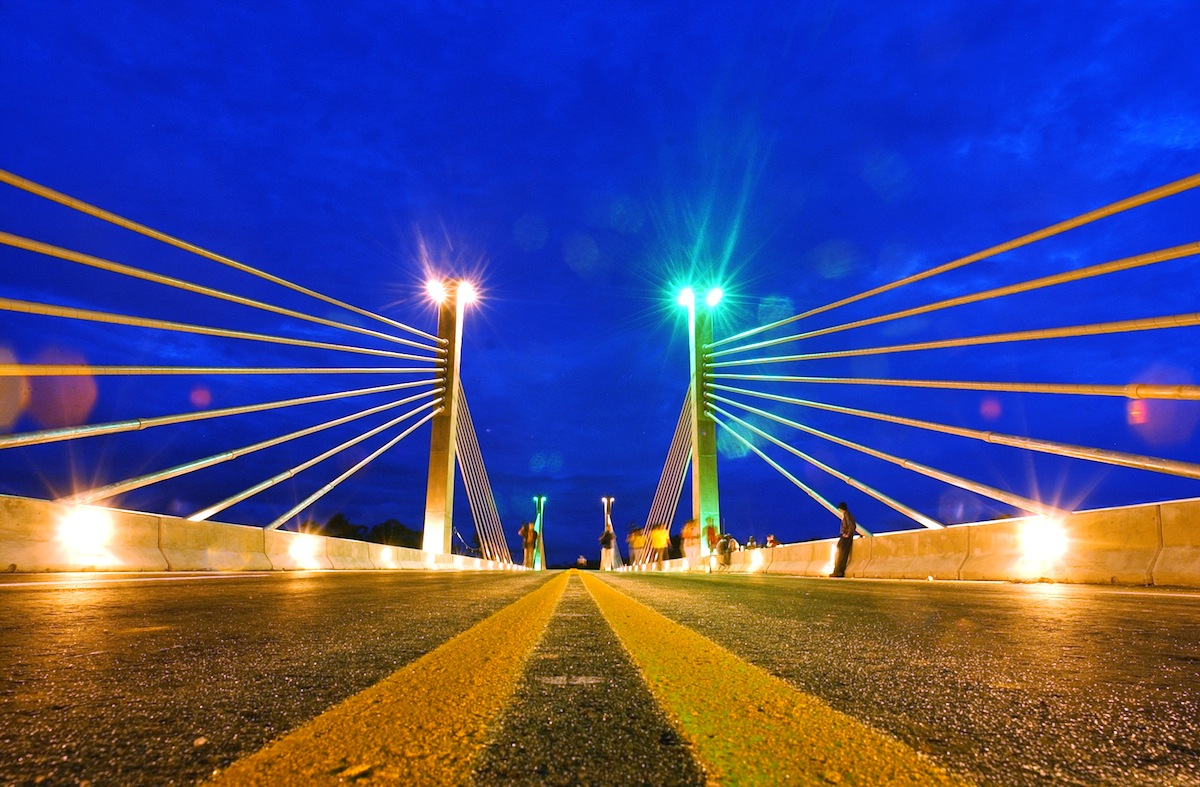 Ponte da Integração Brasil/Peru, Assis Brasil (Foto: Arquivo Secom)